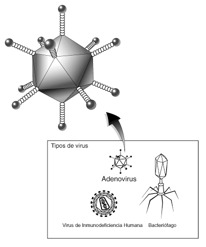 Adenovirus Los adenovirus pueden ser modificados genéticamente para ser usados en terapia génica para tratar fibrosis quística, cáncer y otras enfermedades.